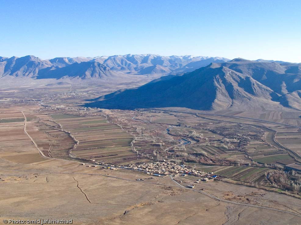 روستای نزدیک کوه لجور